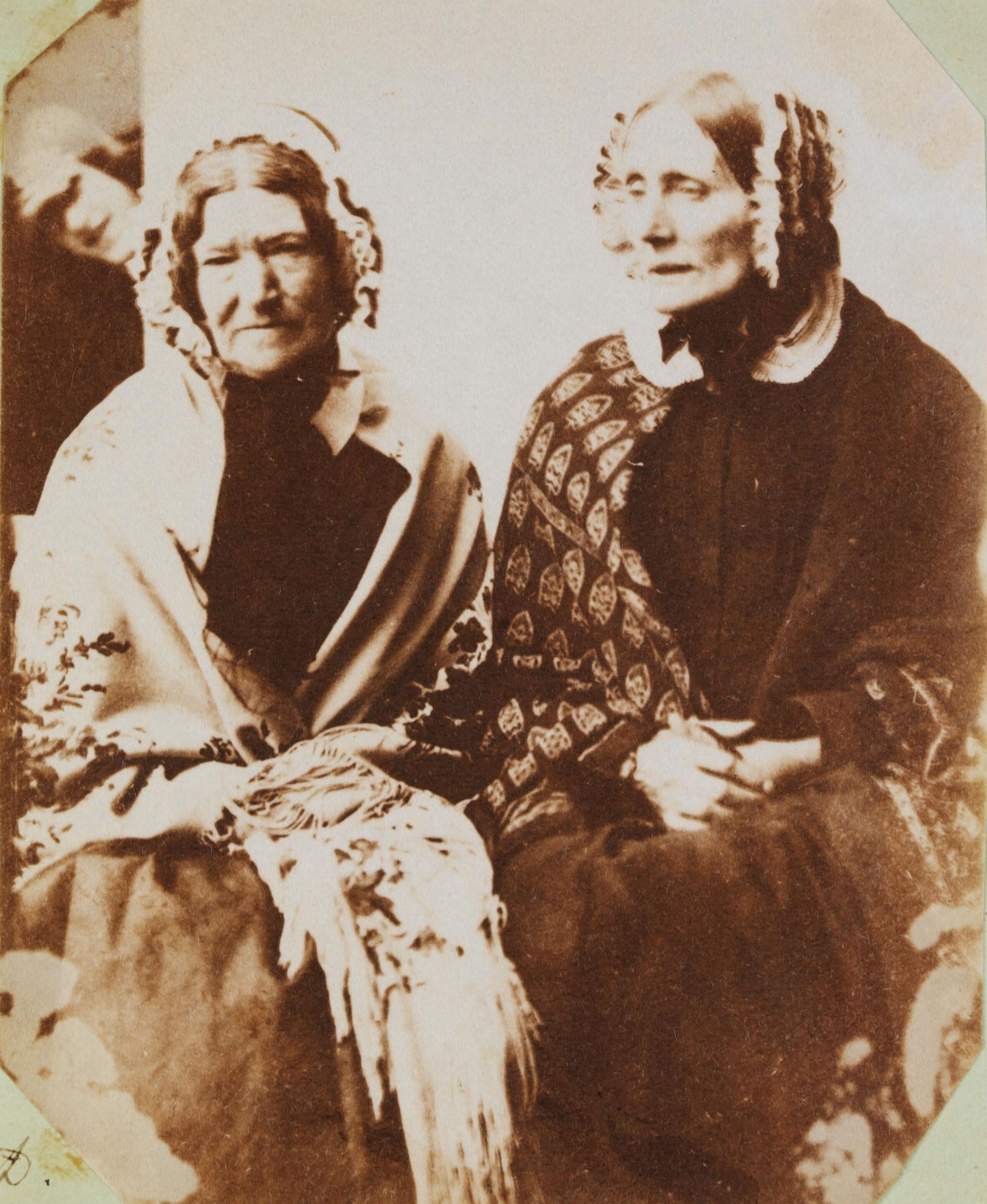 Ffotograffydd/Photographer: Mary Dillwyn (1816-1906) Dyddiad/Date: c.1853 Cyfrwng/Medium: Salt print Cyfeiriad/Reference: mdl00039 Rhif cofnod / Record no.: 3377381 Rhagor o wybodaeth am Ffotograffiaeth Gynnar Abertawe yn Llyfrgell Genedlaethol Cymru More information about Early Swansea Photography at the National Library of Wales